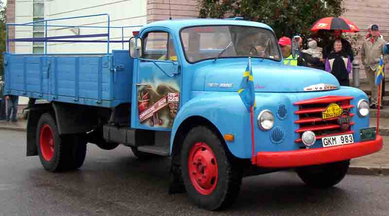 Volvo L465 Starke Truck 1964